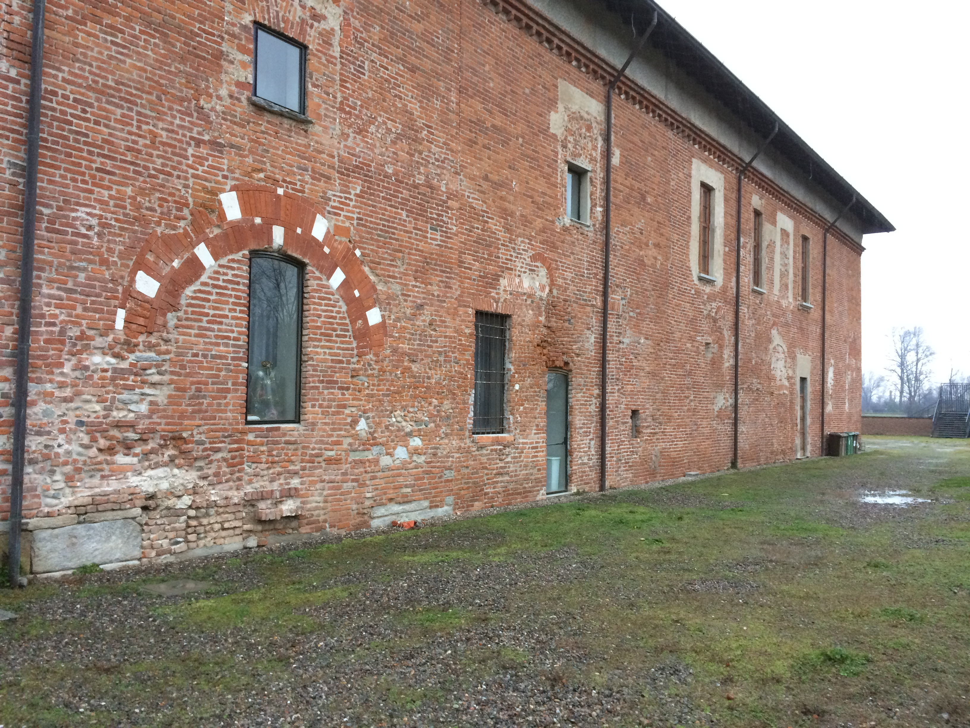 Castello di San Giorgio, Legnano